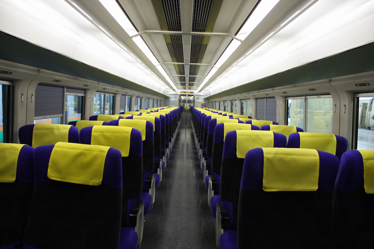 E653系 車内